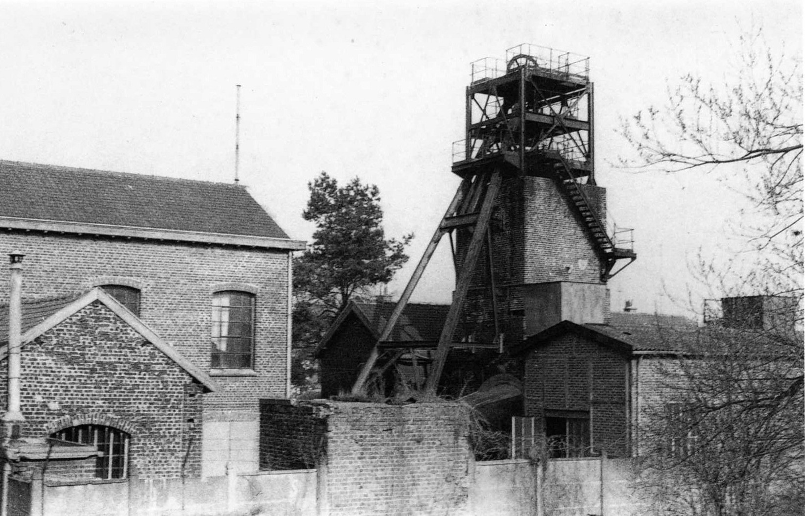 La Fosse n° 2 ou Évrard de la Compagnie des mines de Vicoigne était un charbonnage constitué d'un seul puits situé à Raismes, Nord, Nord-Pas-de-Calais, France.